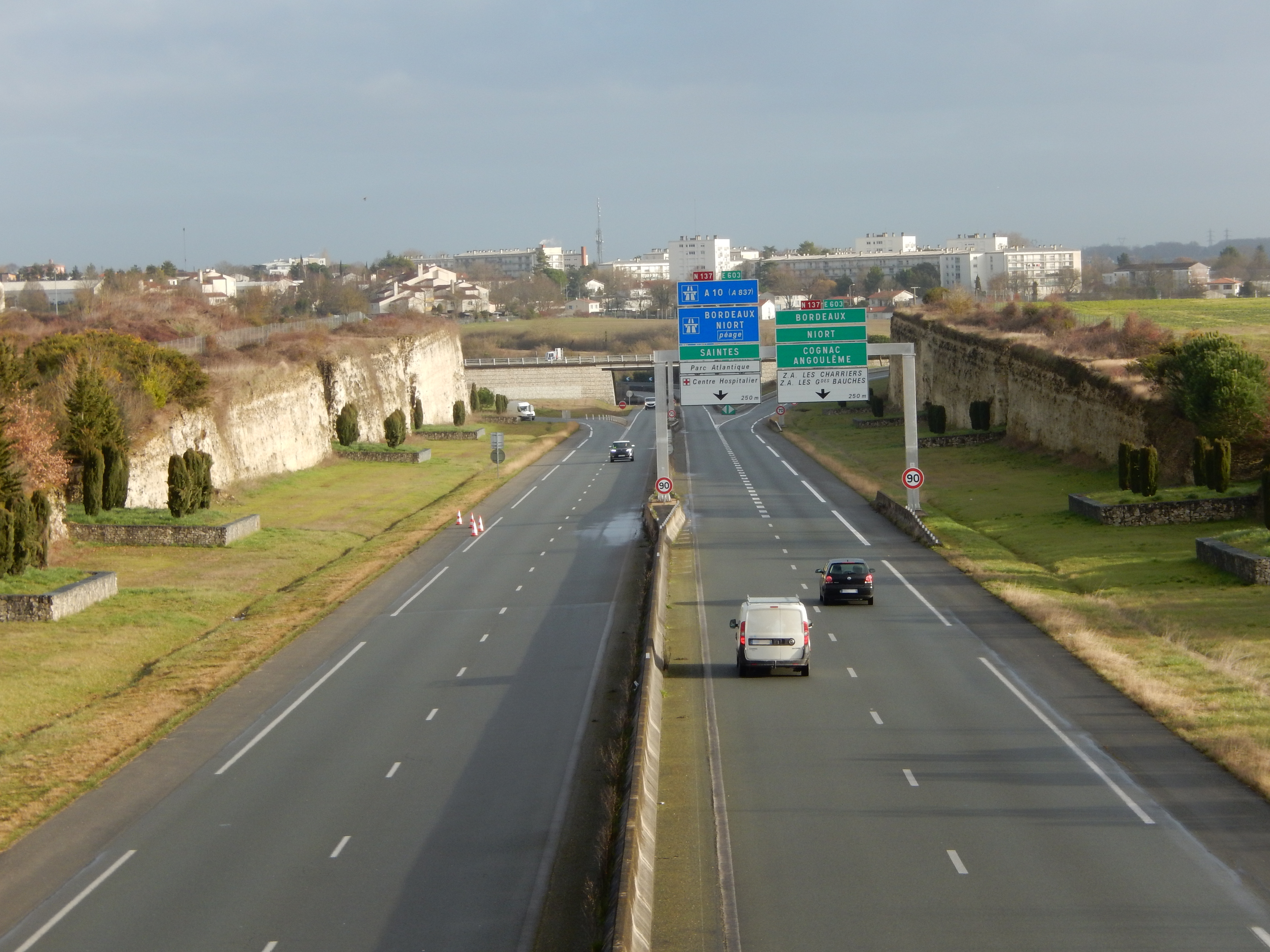 La route nationale 150 au sud-ouest de Saintes, pas loin du Petit Chadignac, photographiée à son extrémité en direction de la rocade de Saintes (que l'on entrevoit au second plan).